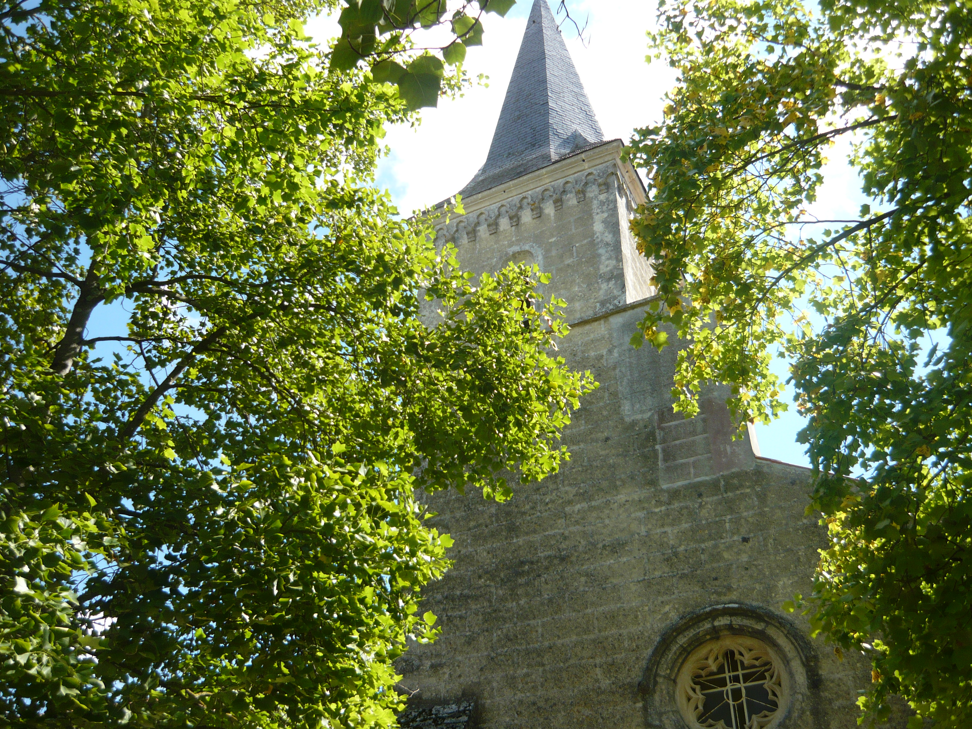 L'église de Saint-Georges-du-Bois en Charente-Maritime